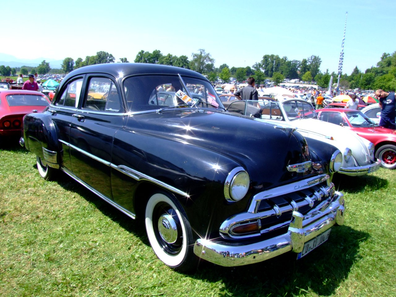 Chevrolet Styleline DeLuxe Baujahr: 1952 PS: 105 3600 ccm Zylinder: 6 Gewicht: 1,8 Tonnen